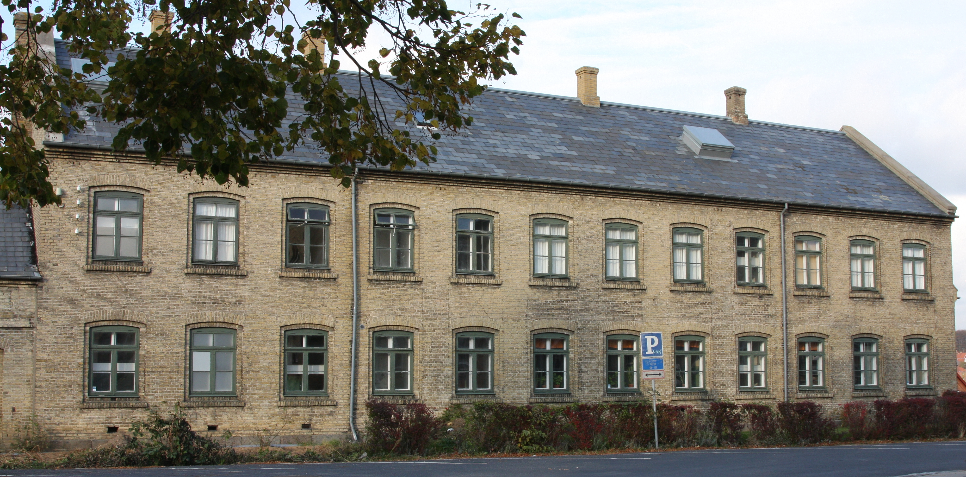 Forsorgsmuseet Viebæltegård i Svendborg / The Viebæltegård Welfare Museum in Svendborg, Funen, Denmark